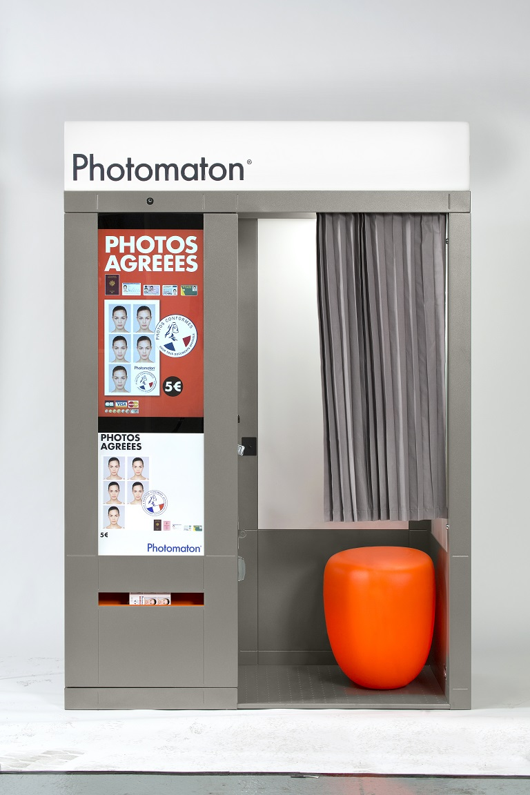 La cabine photographique Photomaton dessinée par Philippe Starck